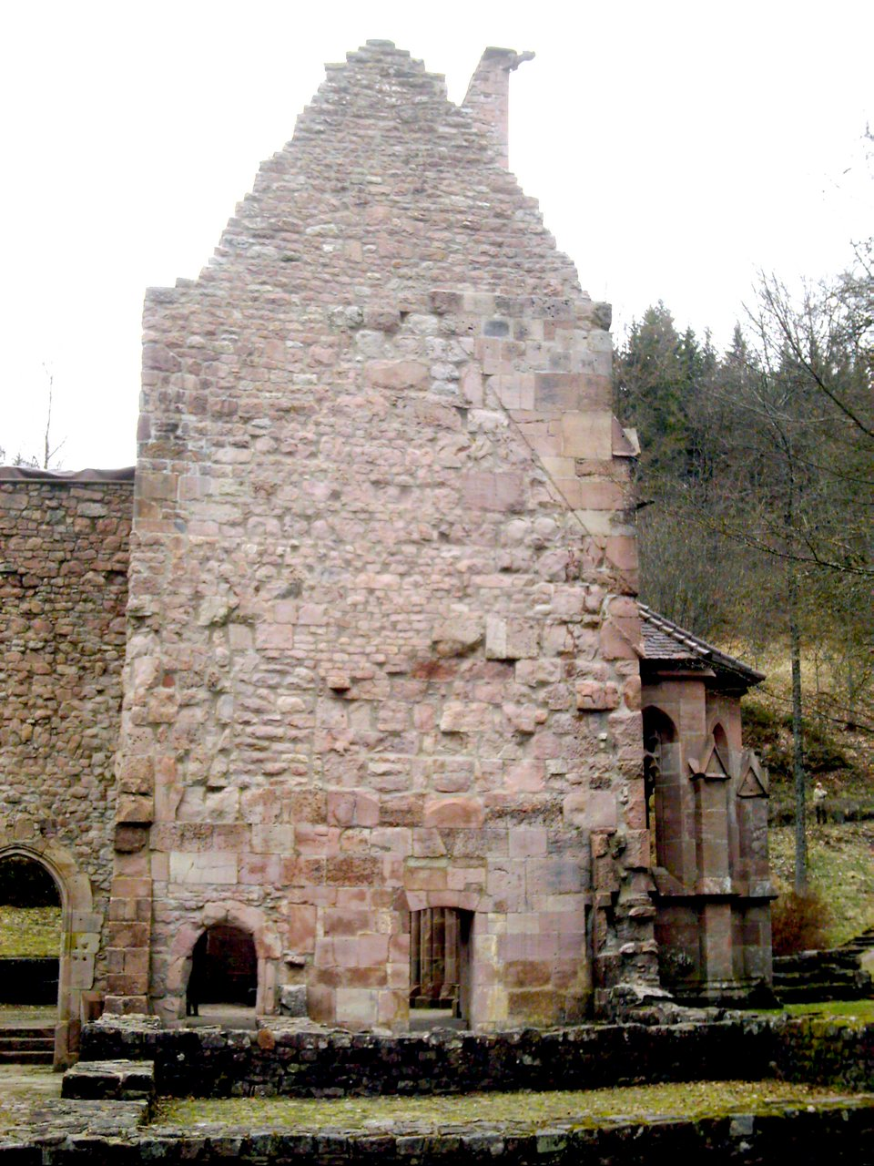 Klosterruine Allerheiligen (Schwarzwald)